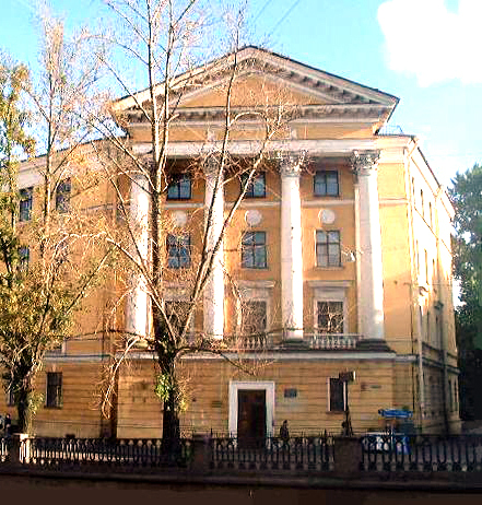 Школа N256, канал Грибоедова, дом 76, Санкт-Петербург. Архитектор М.А.Шепилевский, 1947 год.